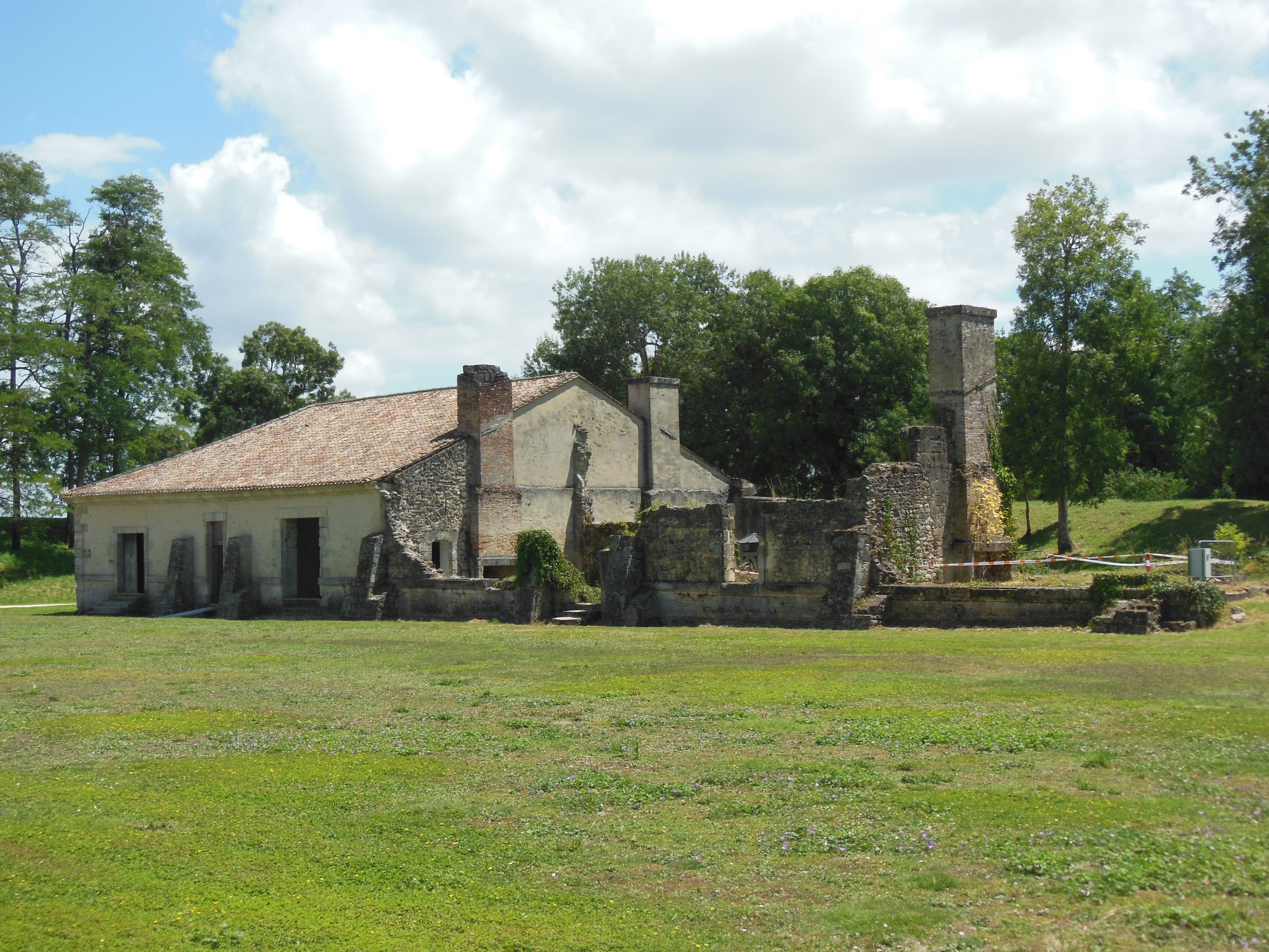 caserne Sud du Fort Médoc